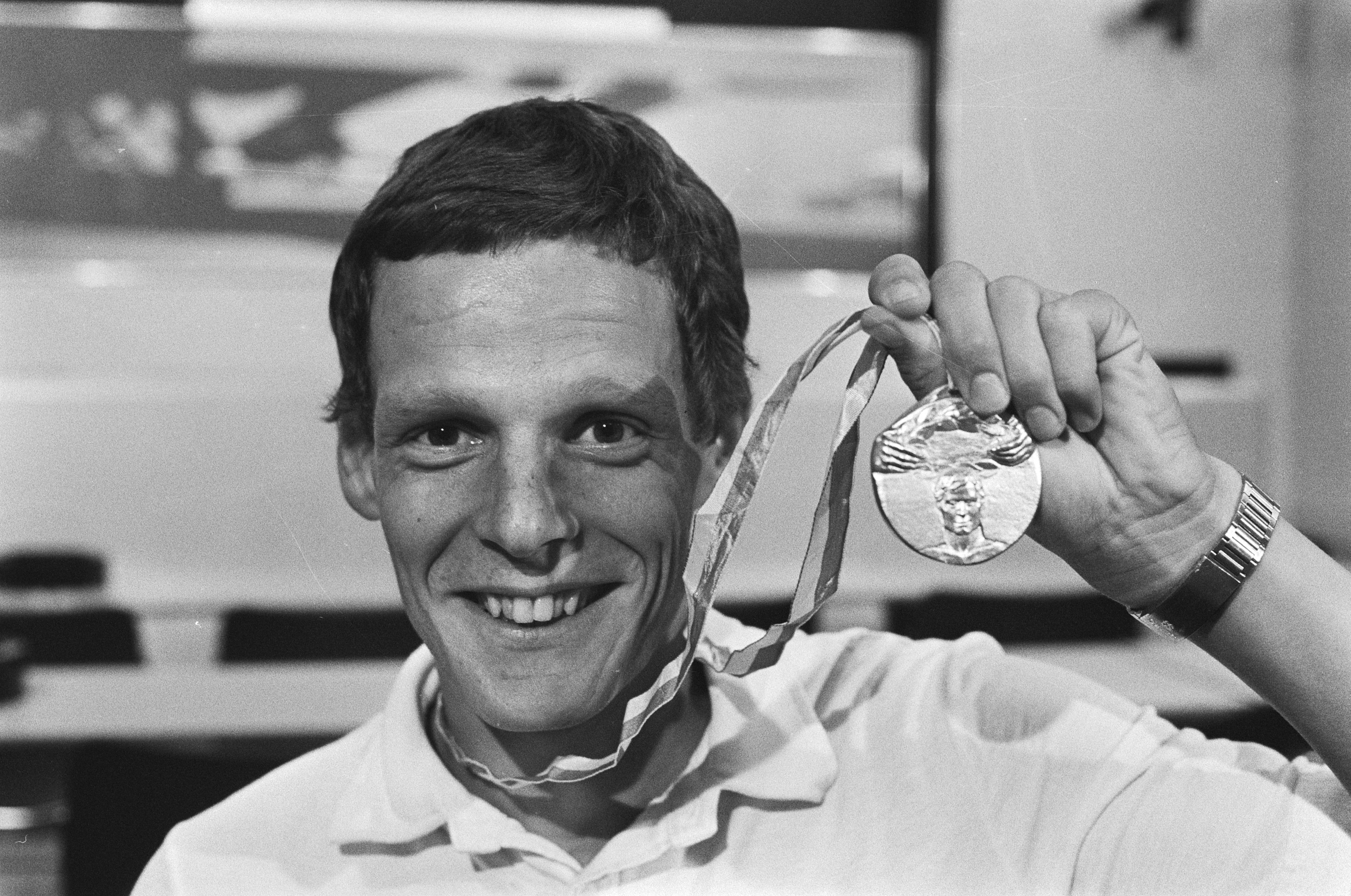 Collectie / Archief : Fotocollectie Anefo Reportage / Serie : Aankomst van Gerard Nijboer op Schiphol Beschrijving : Gerard Nijboer, Europees kampioen marathon toont zijn medaille Datum : 13 september 1982 Locatie : Noord-Holland, Schiphol Trefwoorden : aankomsten, atletiek, kampioenen, medailles, portretten Persoonsnaam : Nijboer, Gerard Fotograaf : Dijk, Hans van / Anefo Auteursrechthebbende : Nationaal Archief Materiaalsoort : Negatief (zwart/wit) Nummer archiefinventaris : bekijk toegang 2.24.01.05 Bestanddeelnummer : 932-3224